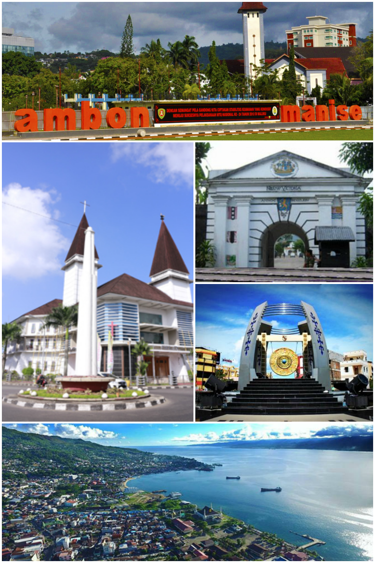 Beberapa markah tanah Kota Ambon.